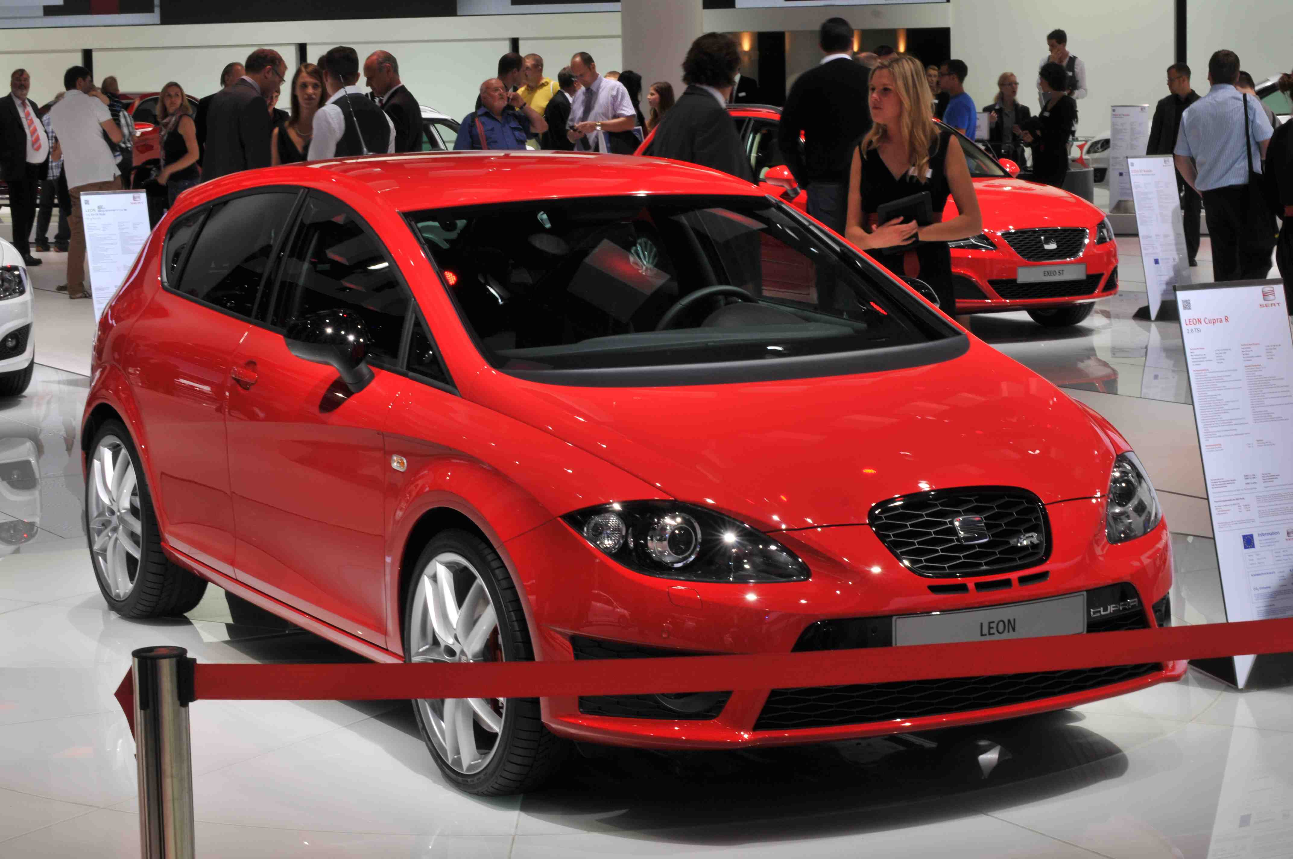 IAA 2011 - Internationale Automobilausstellung in Frankfurt/Main